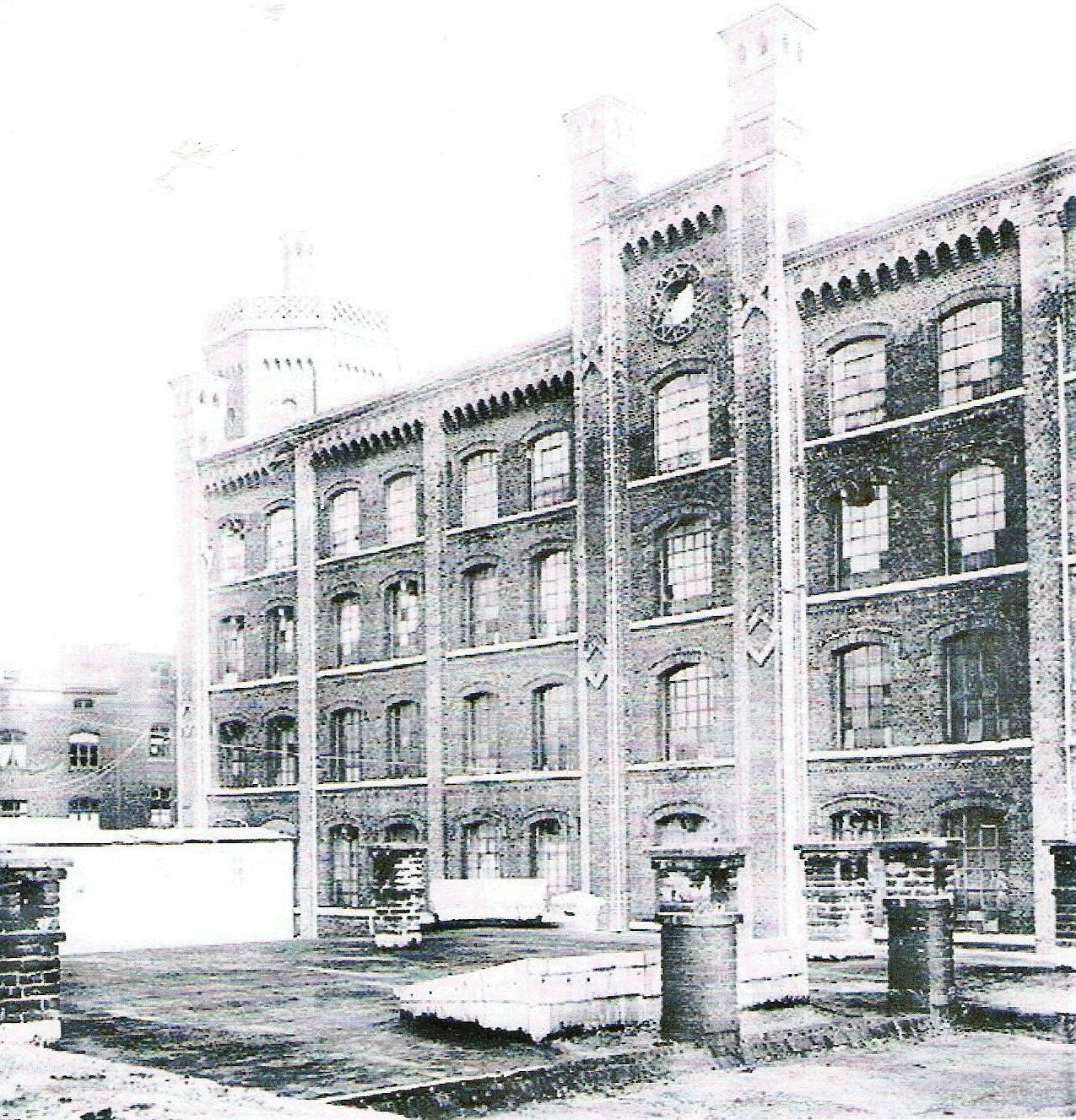 Scan eines alten Familienfotos